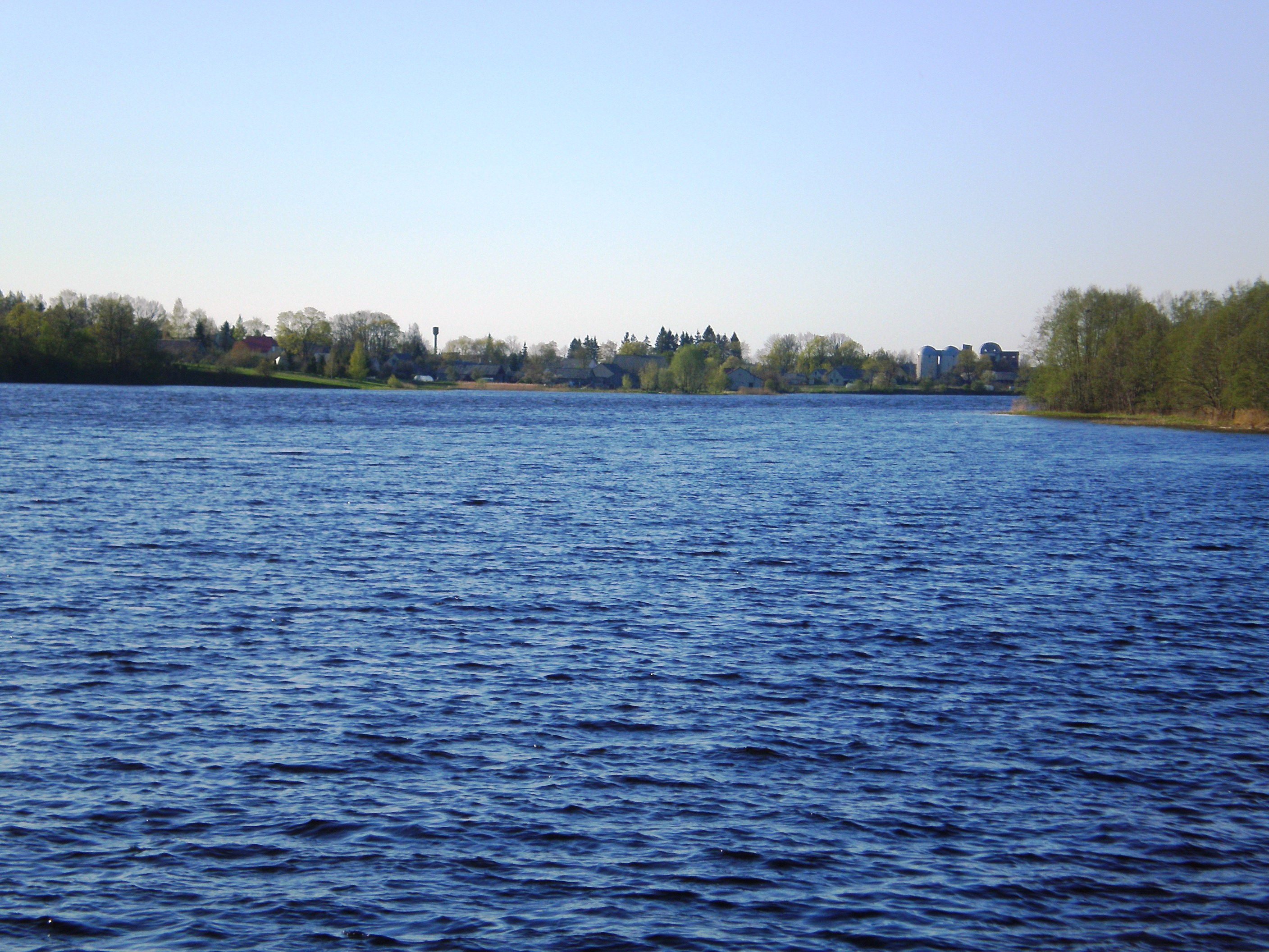 Vaitiekūnų tvenkinys, Radviliškio raj.